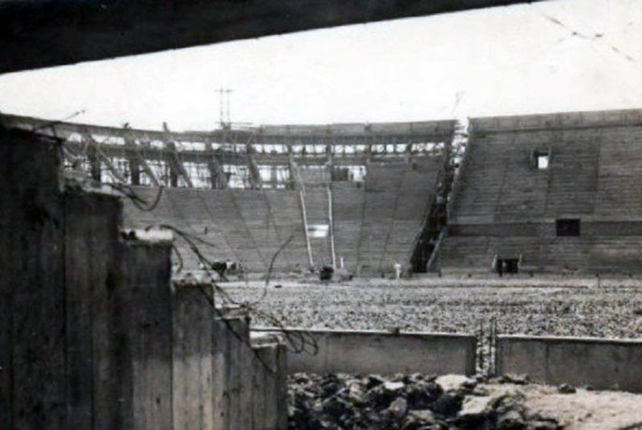 Construcción el Estadio Tomás Adolfo Ducó entre 1940 y 1945.